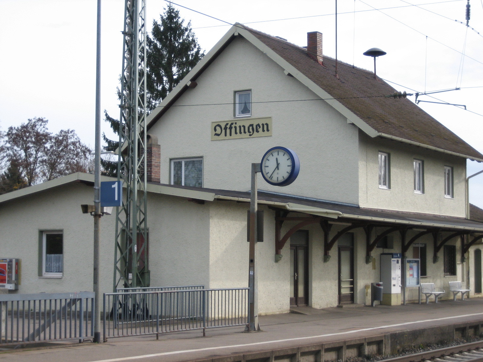 Bahnhofsgebäude in Offingen